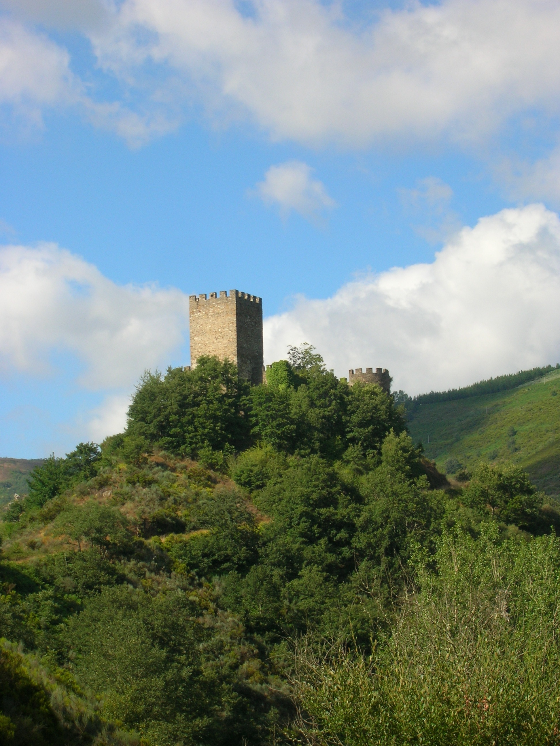 Vista del Castillo de Doiras, en el concello de Cervantes (Lugo, Galiza)